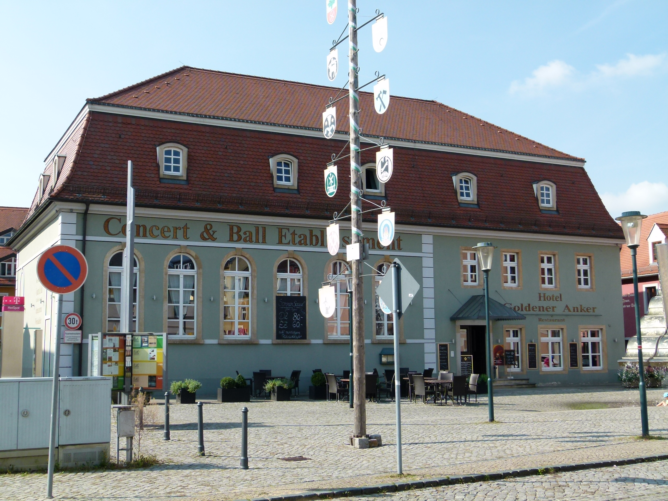 Denkmalgeschütztes Haus, Altkötzschenbroda 61, Radebeul, Sachsen